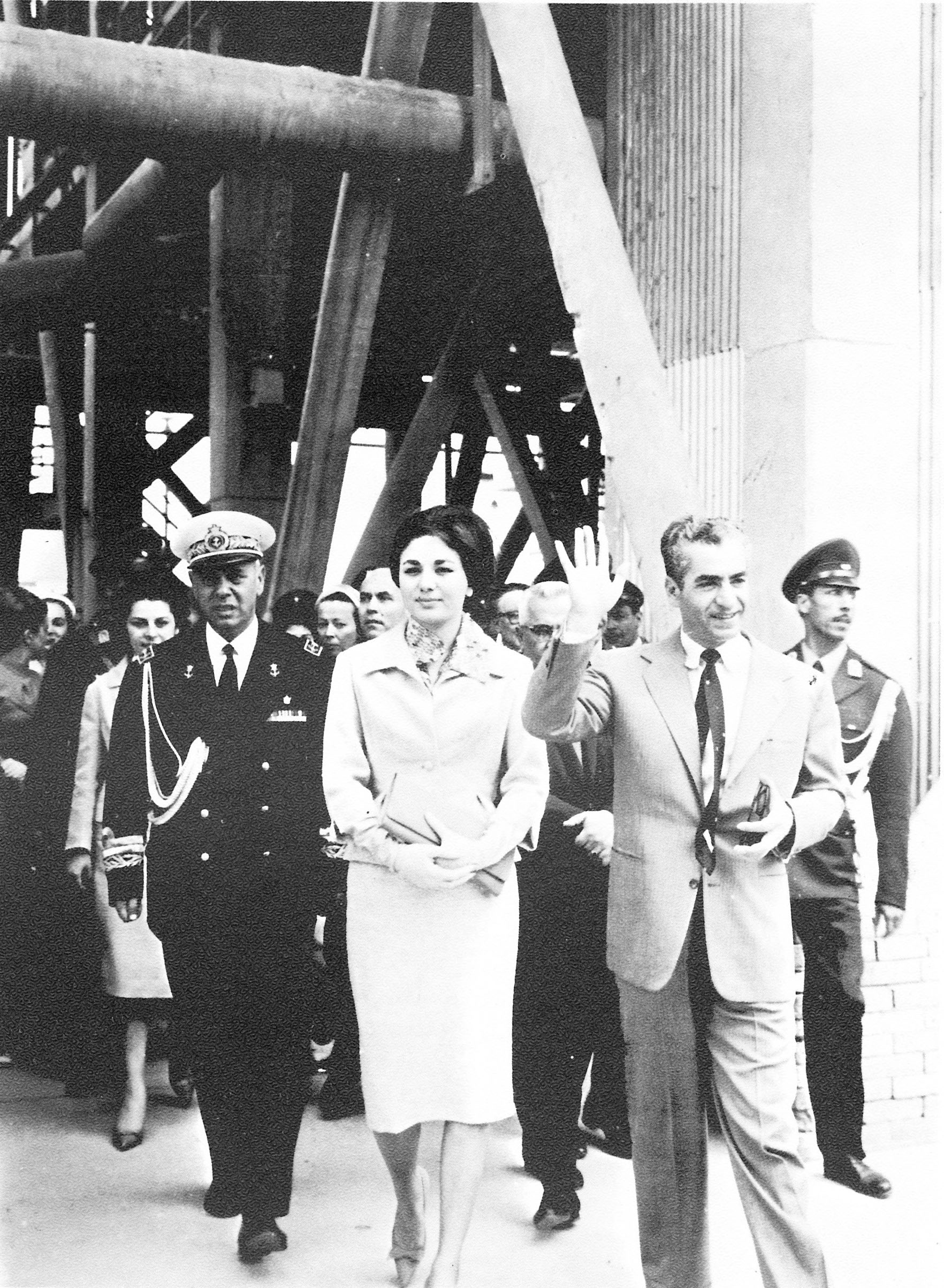 Shah and Shahbanou visit Abadan Oil Refinery